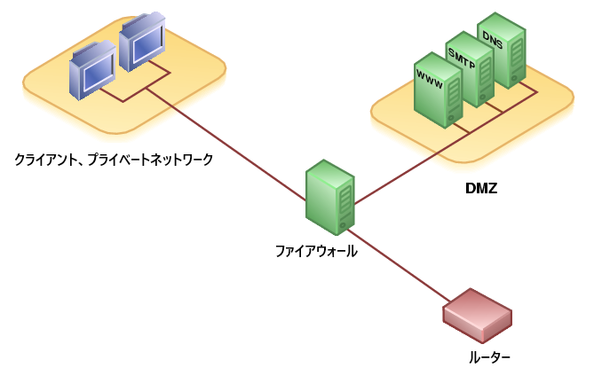 このファイルはファイル:Demilitarized_Zone_Diagram.pngの記述を翻訳したものです。 このファイルの利用条件はすべて元ファイルに基づくものとします。